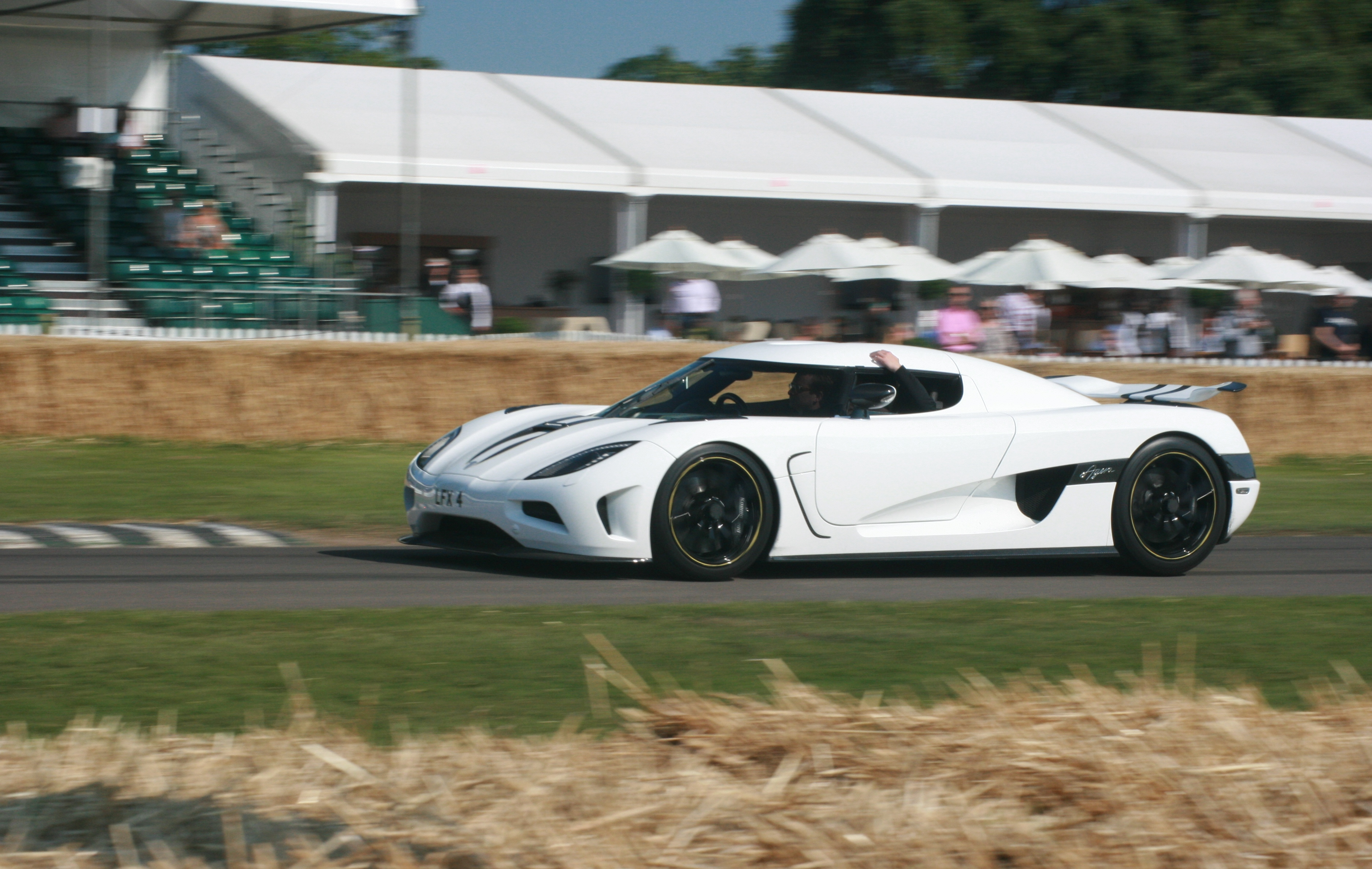 Keonigsegg Agera R